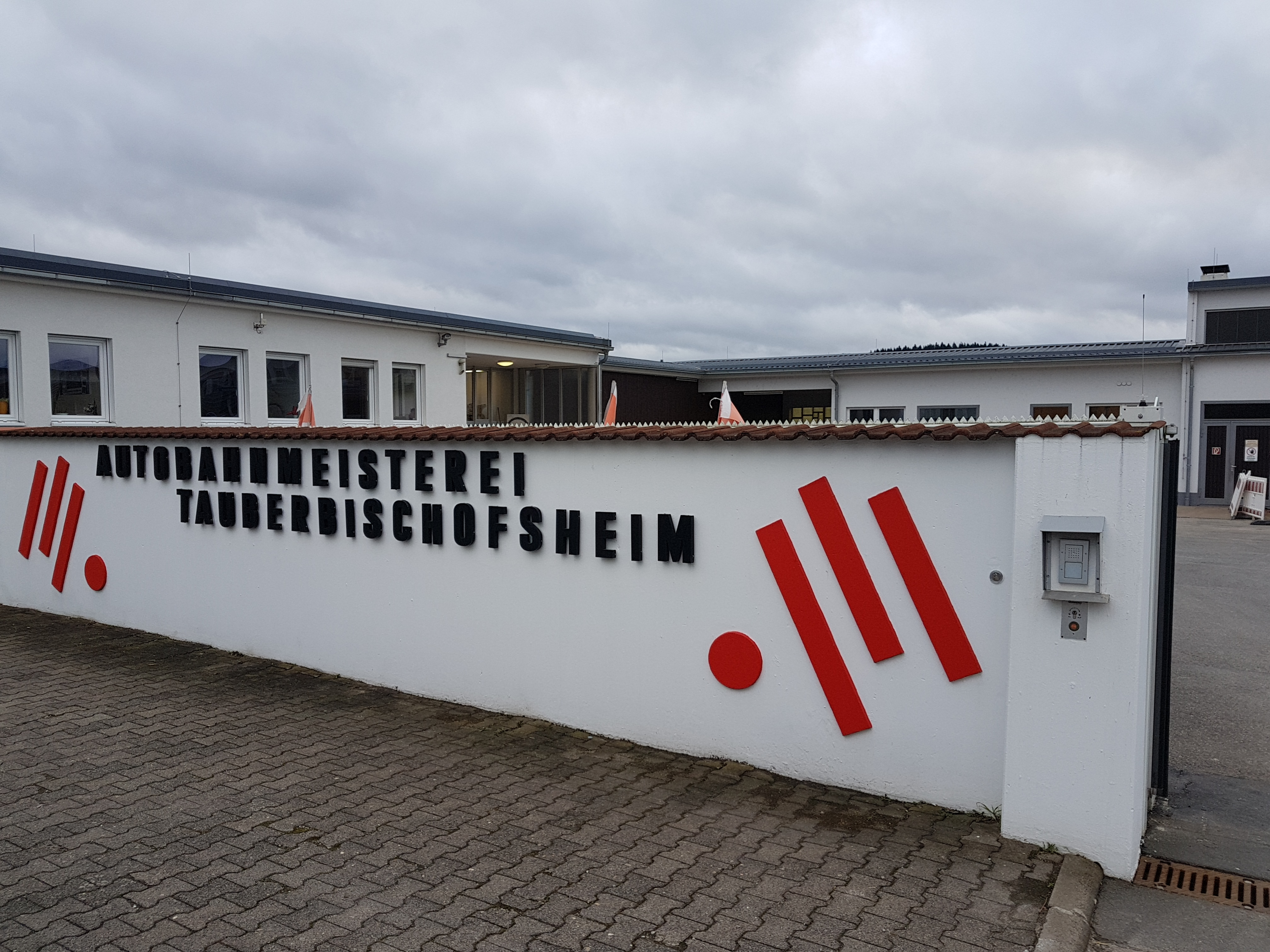 Die Autobahnmeisterei Tauberbischofsheim, im Tauberbischofsheimer Stadtteil Distelhausen, an der Anschlussstelle Tauberbischofsheim (Autobahnabfahrt) der Bundesautobahn 81. In unmittelbarer Nähe (etwas unterhalb) befindet sich auch die Autobahnpolizei Tauberbischofsheim.